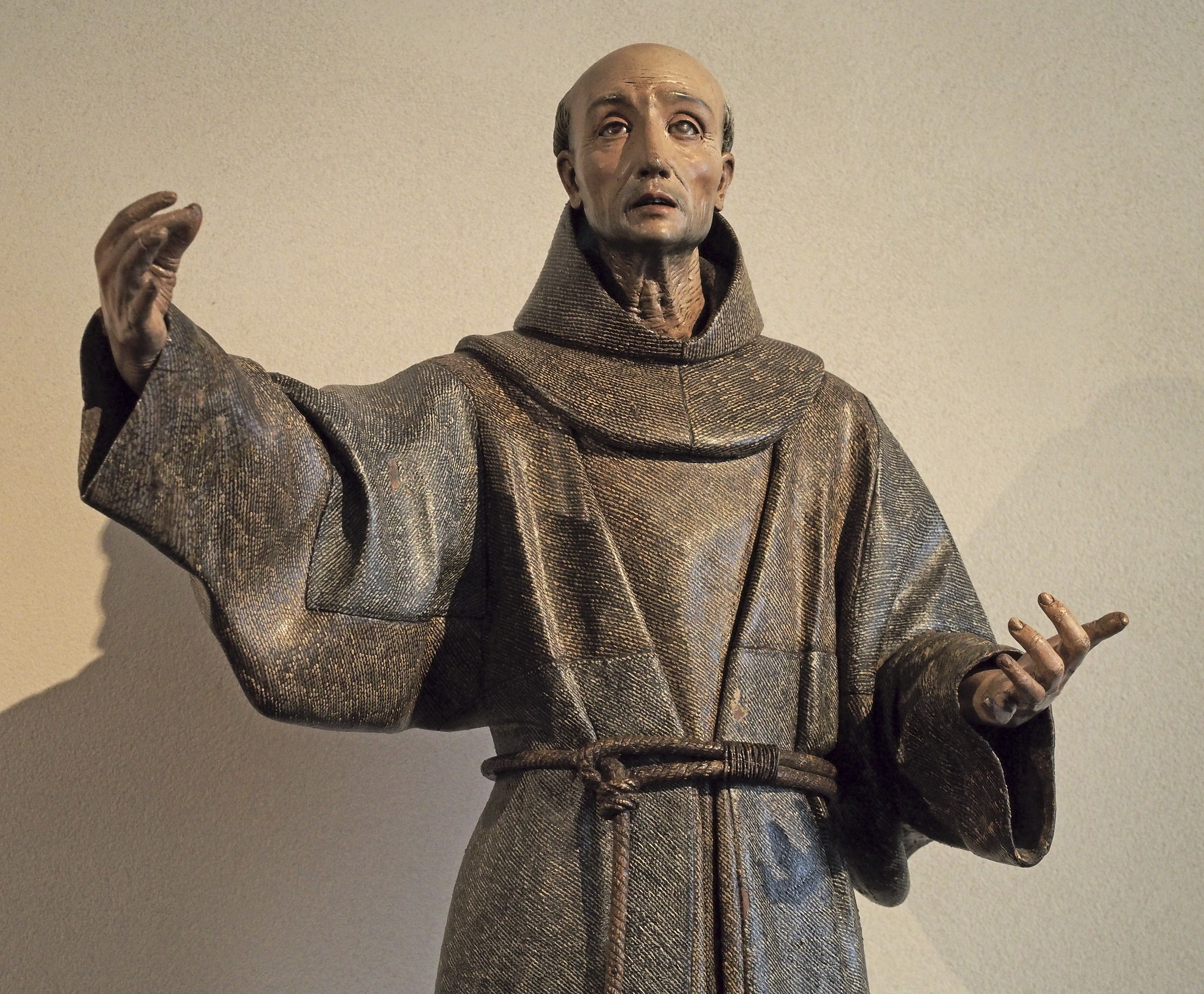 San Pedro de Alcántara, detalle, c.1663; Pedro de Mena (1628-1688). Museo Nacional de Escultura, Valladolid.